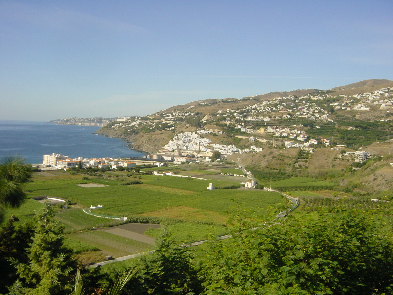 Localidad de Caleta-La Guardia, en el municipio de Salobreña (Granada España)